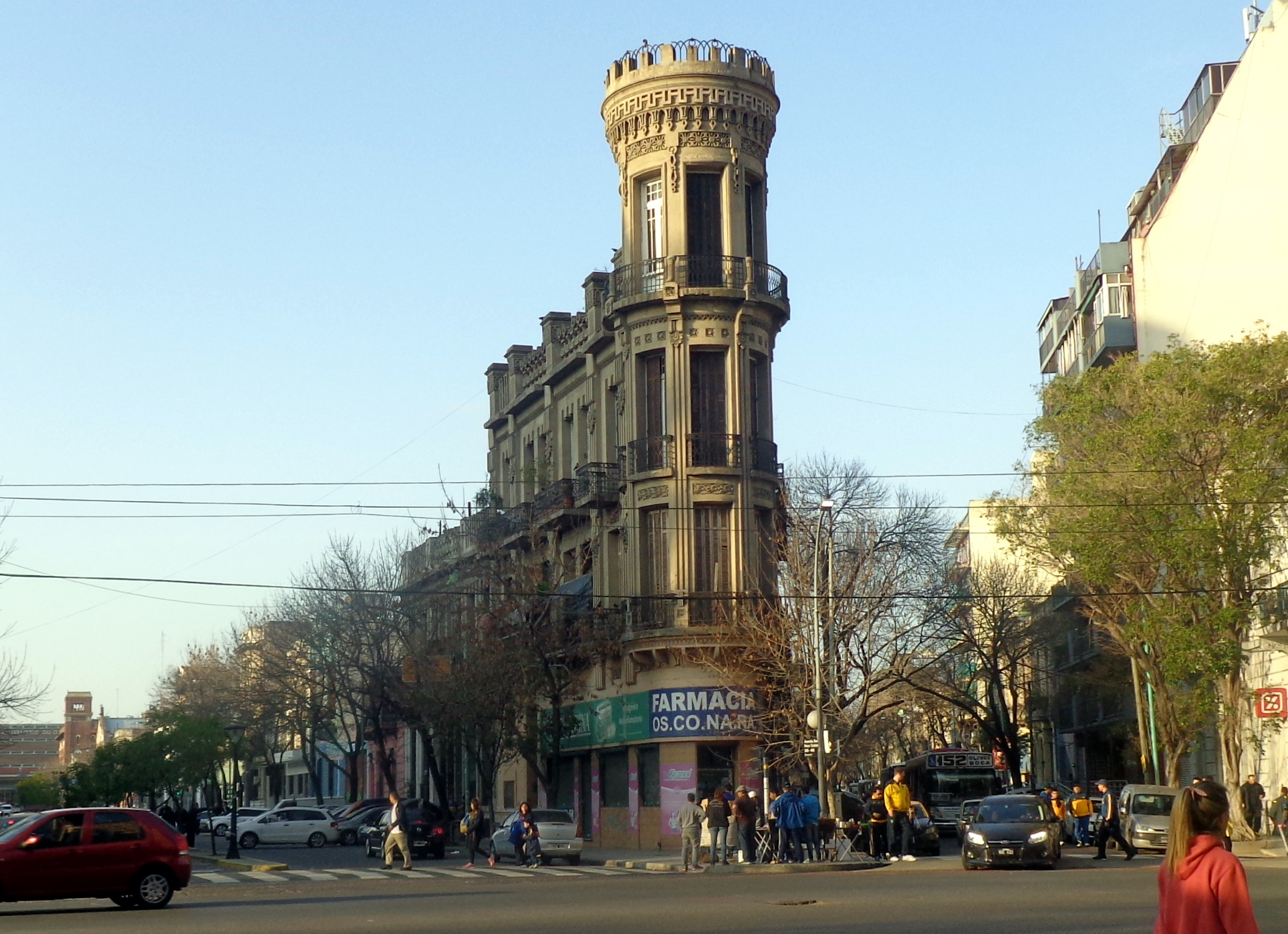 "Torre fantasma" en Wenceslao Villafañe 385 (esquina con Perez Galdos), La Boca, Buenos Aires, Argentina.